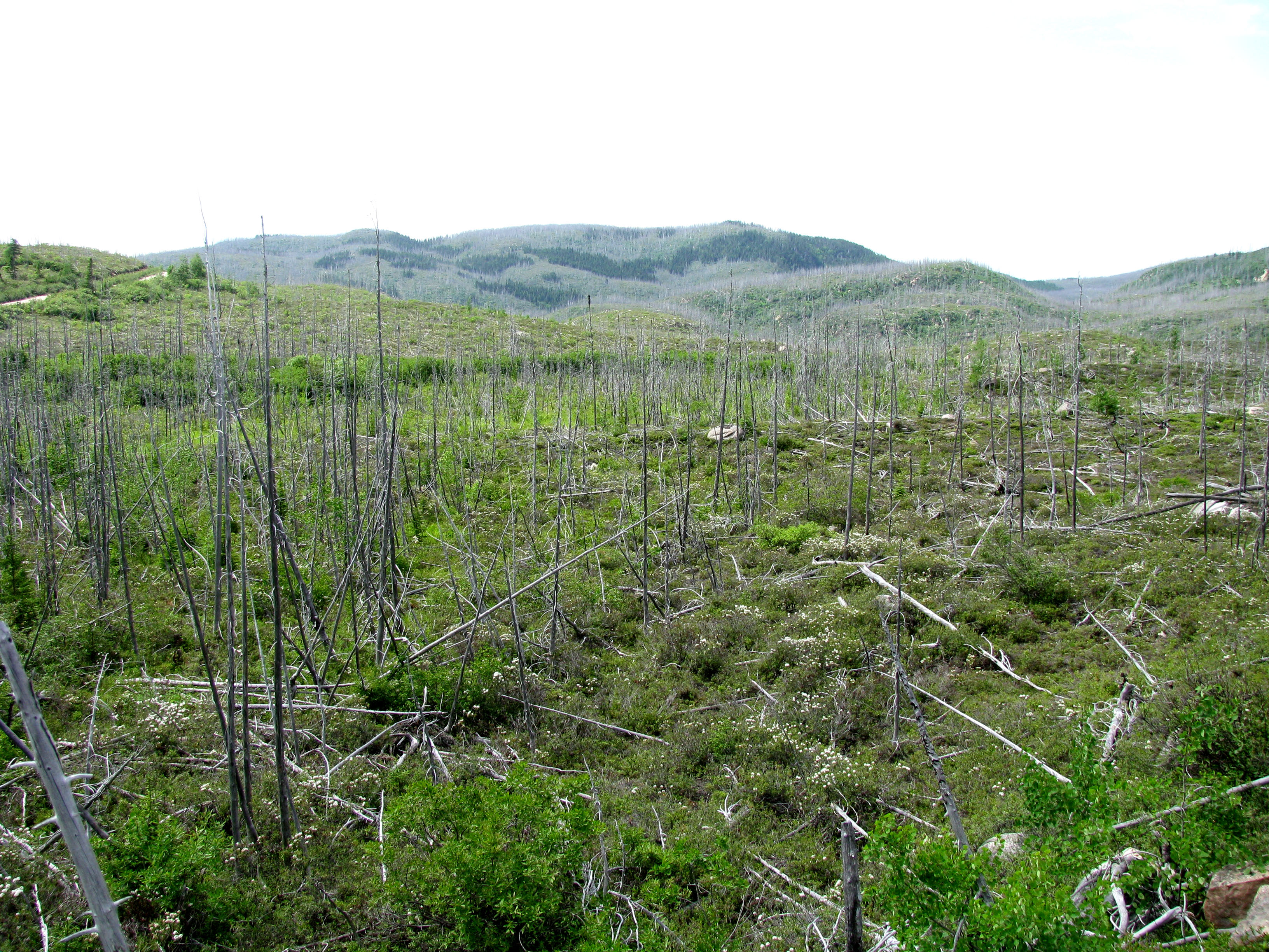 Parc national des Grands-Jardins, secteur Thomas-Fortin, Québec, Canada